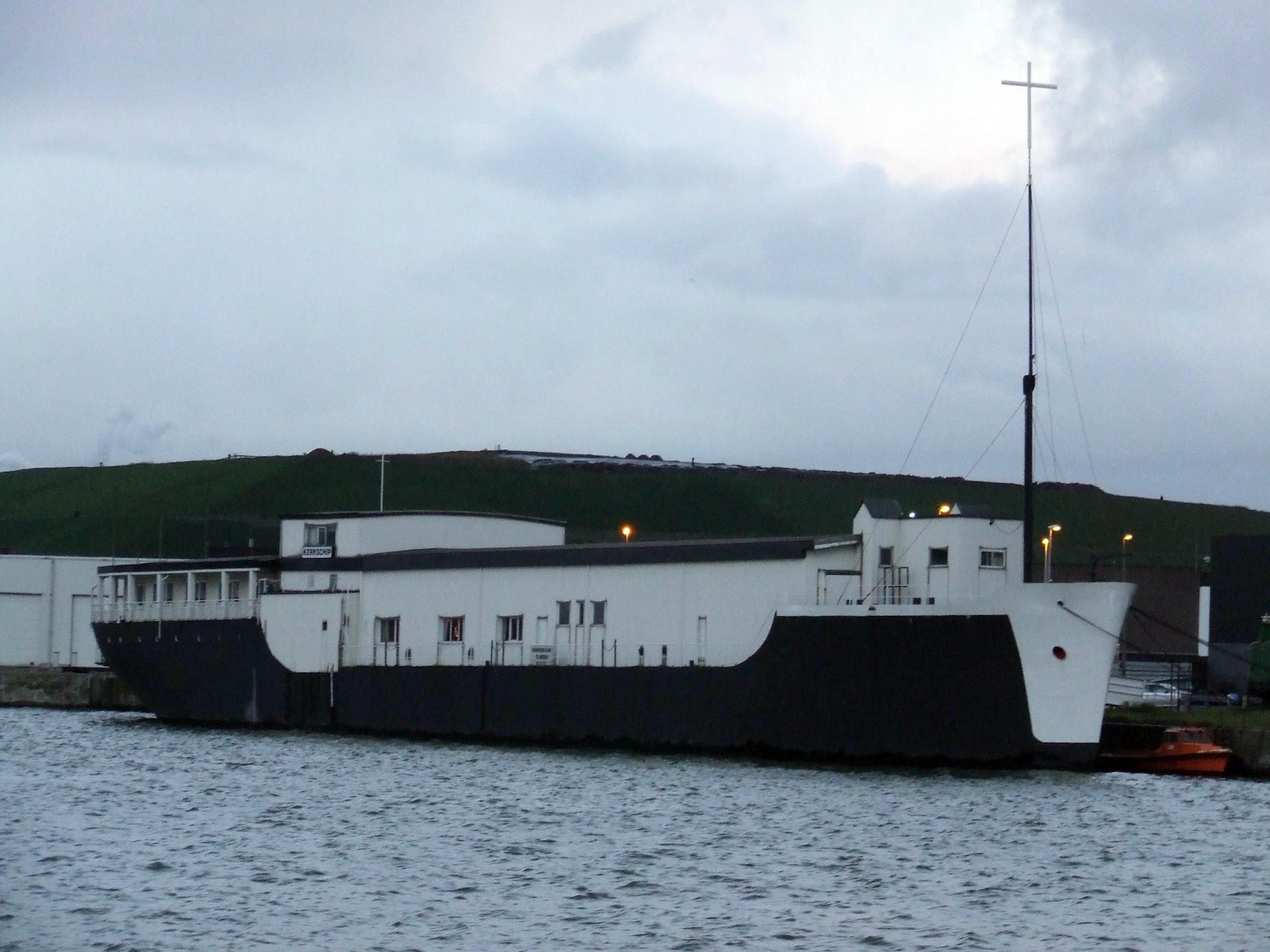 Kirchenschiff Antwerpen in Kanaaldok B1